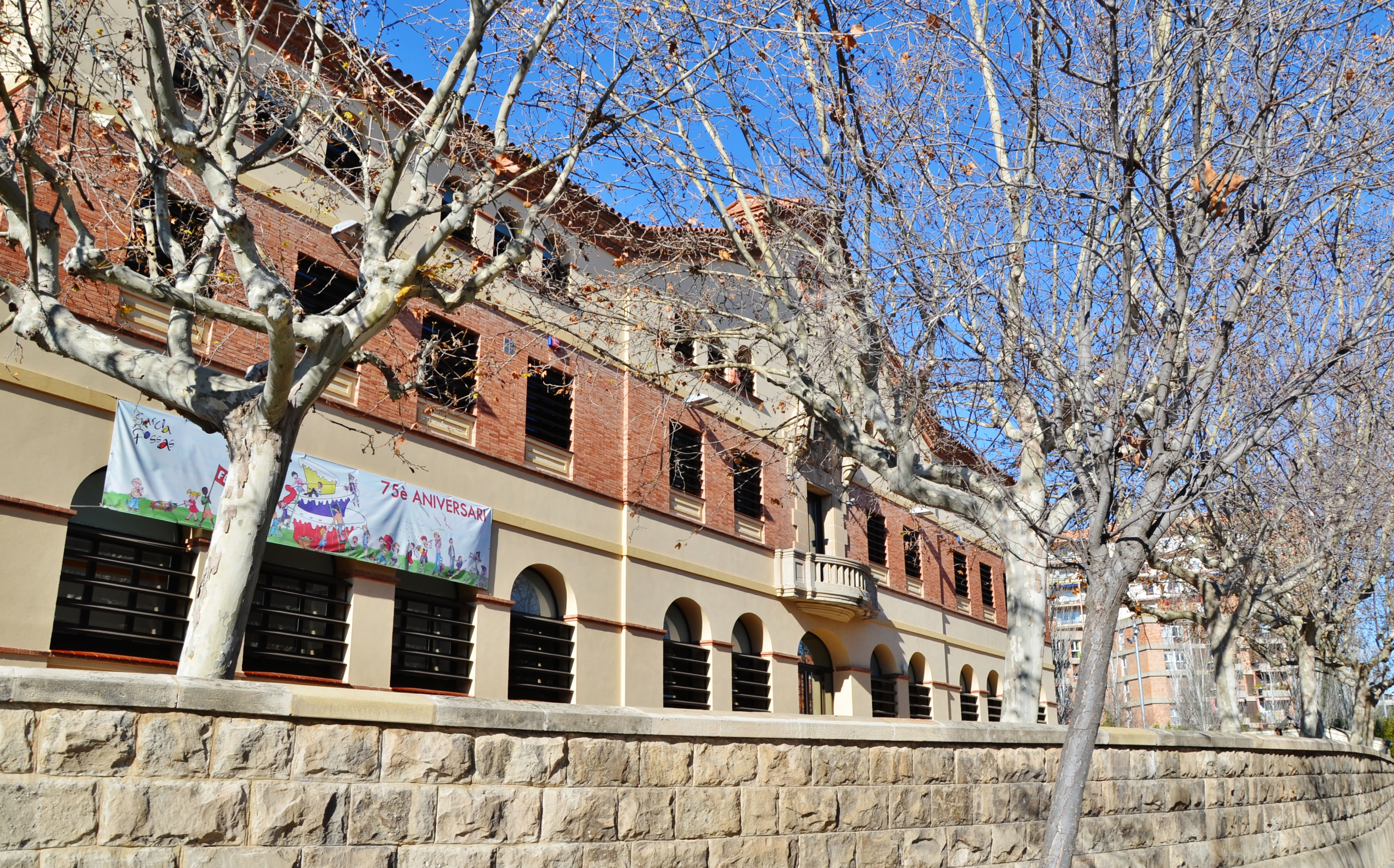 Escoles públiques Garcia Fossas (Igualada)